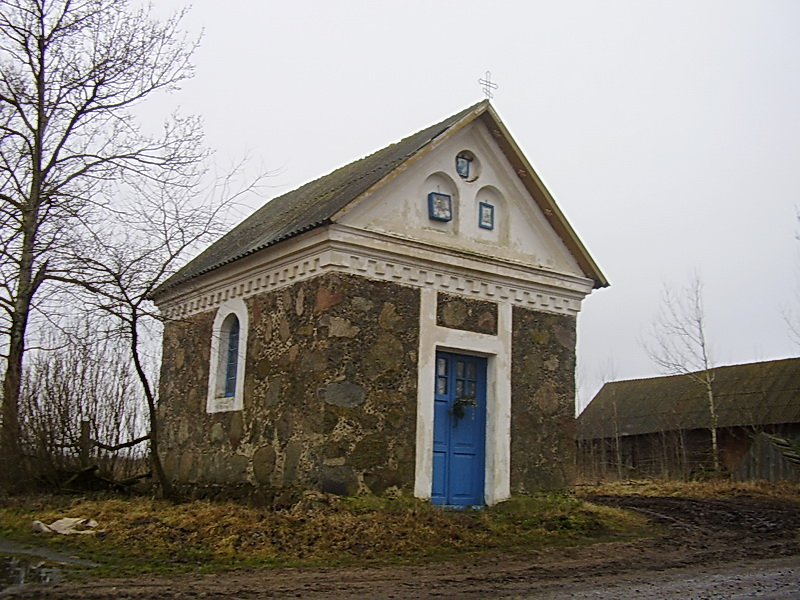 Малая Вобрына. Капліца